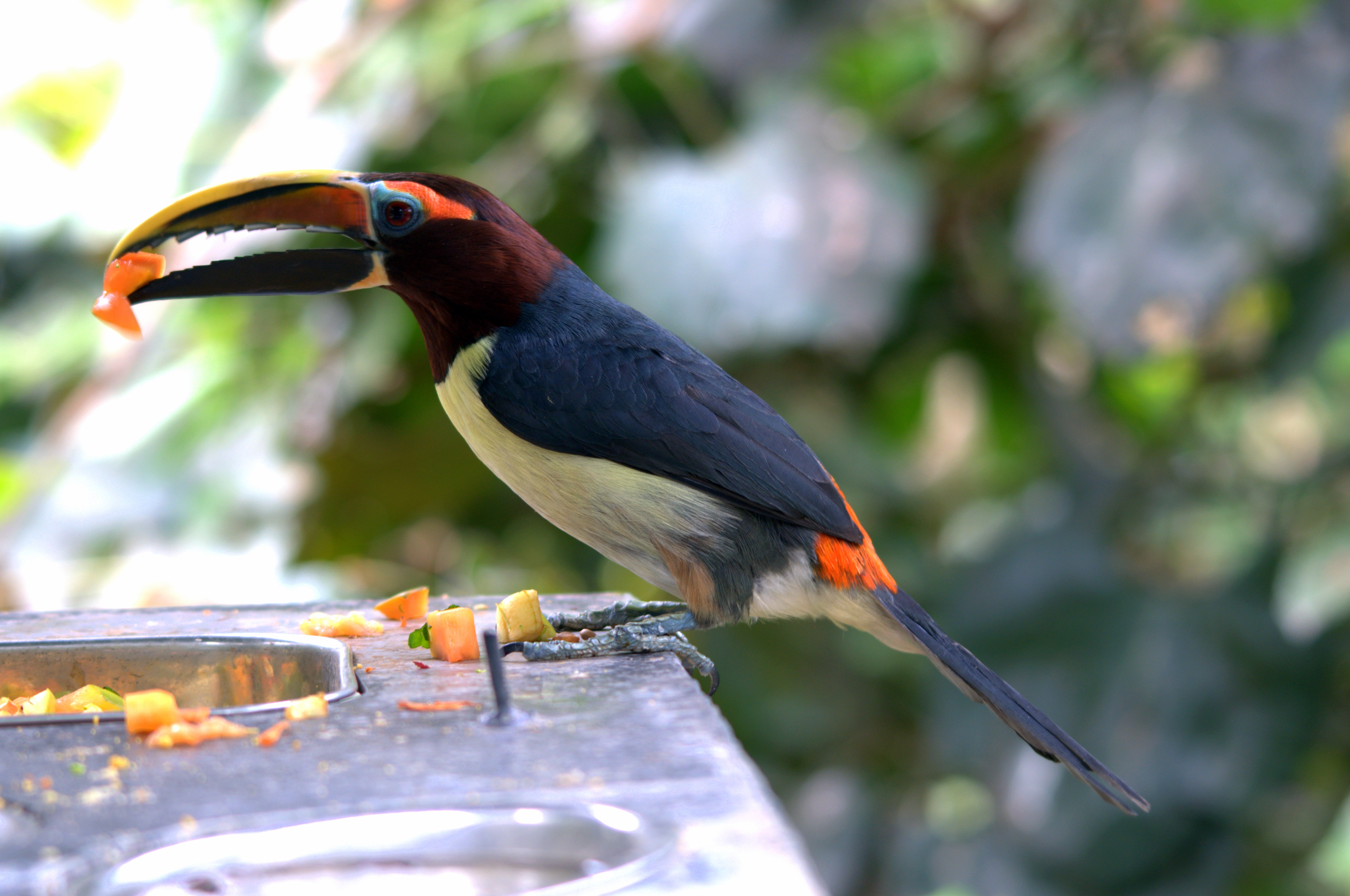 _Pteroglossus viridis male